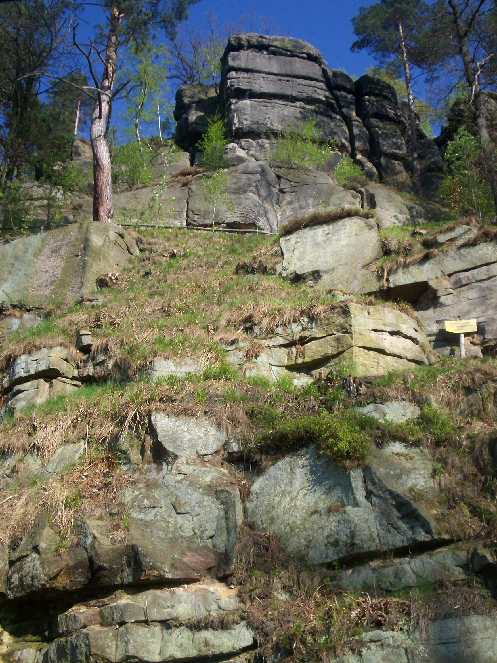 Lwówek Ślaski, grupa skał “Szwajcaria Lwówecka”.